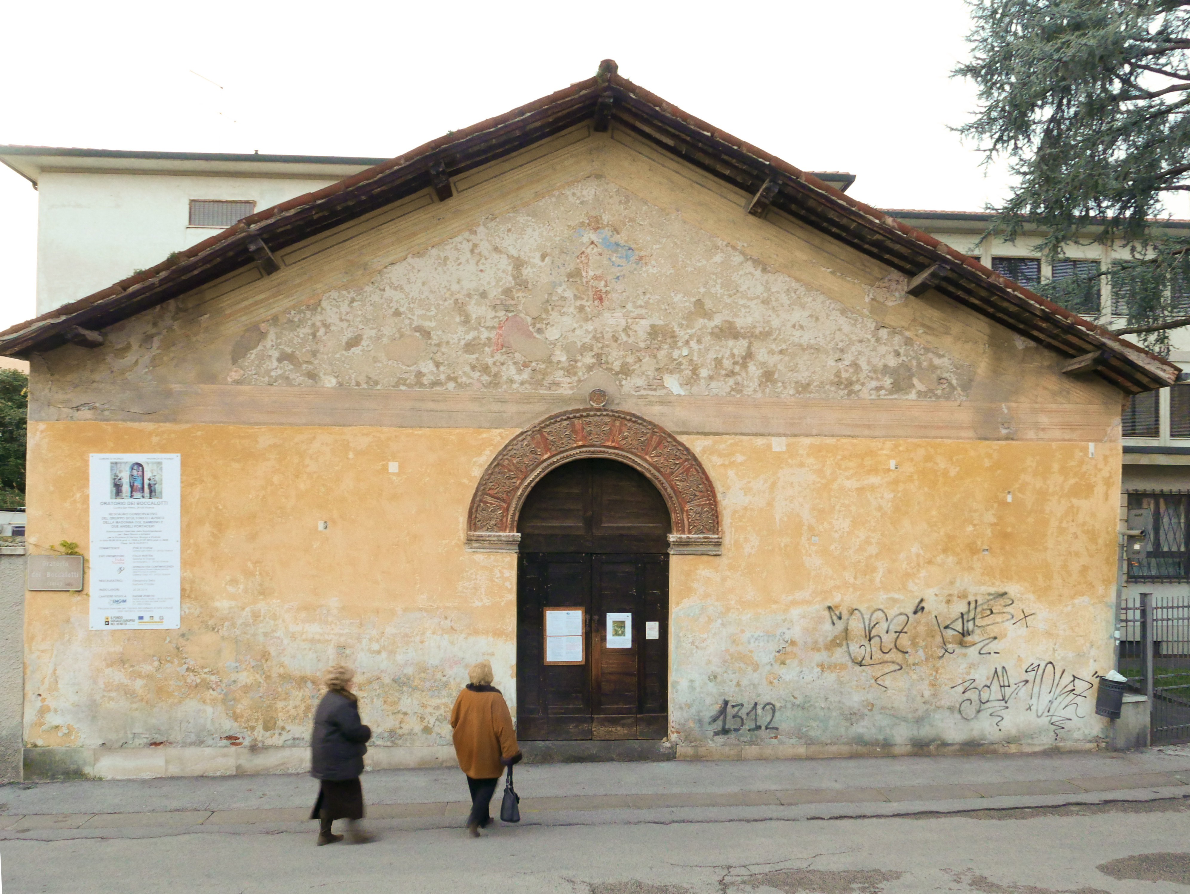 Facciata